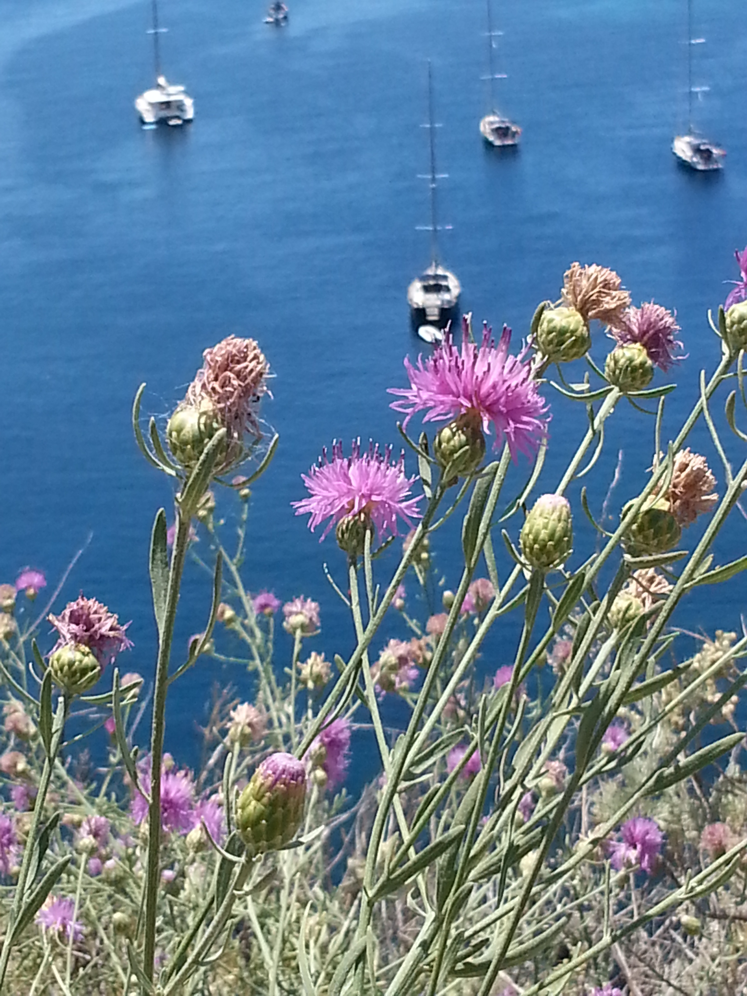 Centaurea aeolica Guss. ex Lojac. Salina (isole Eolie)